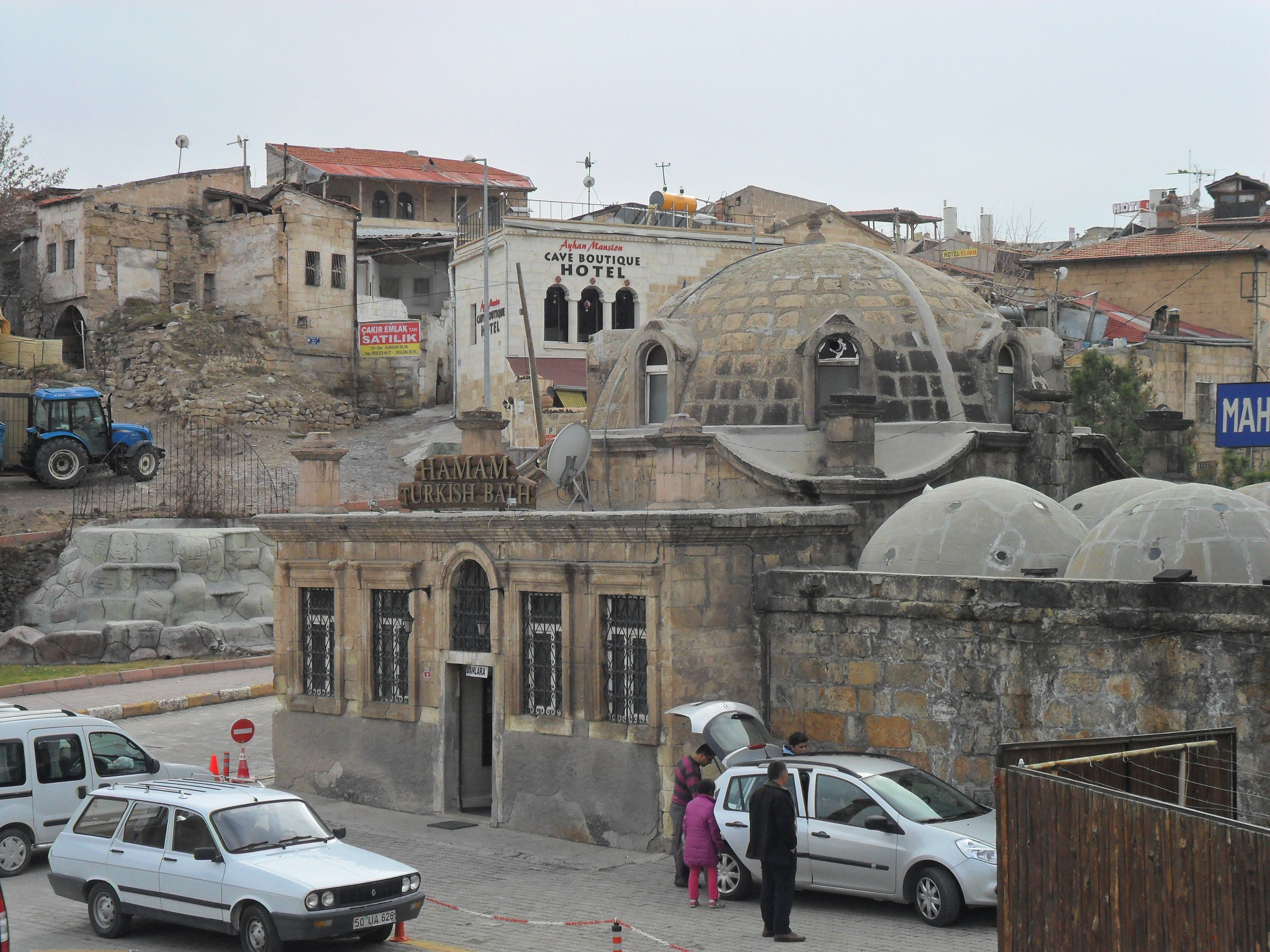 Ürgüp ilçe merkezinde yer alan Türk hamamı.